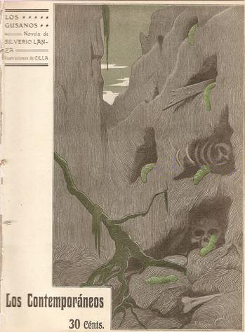 Portada de Los gusanos.